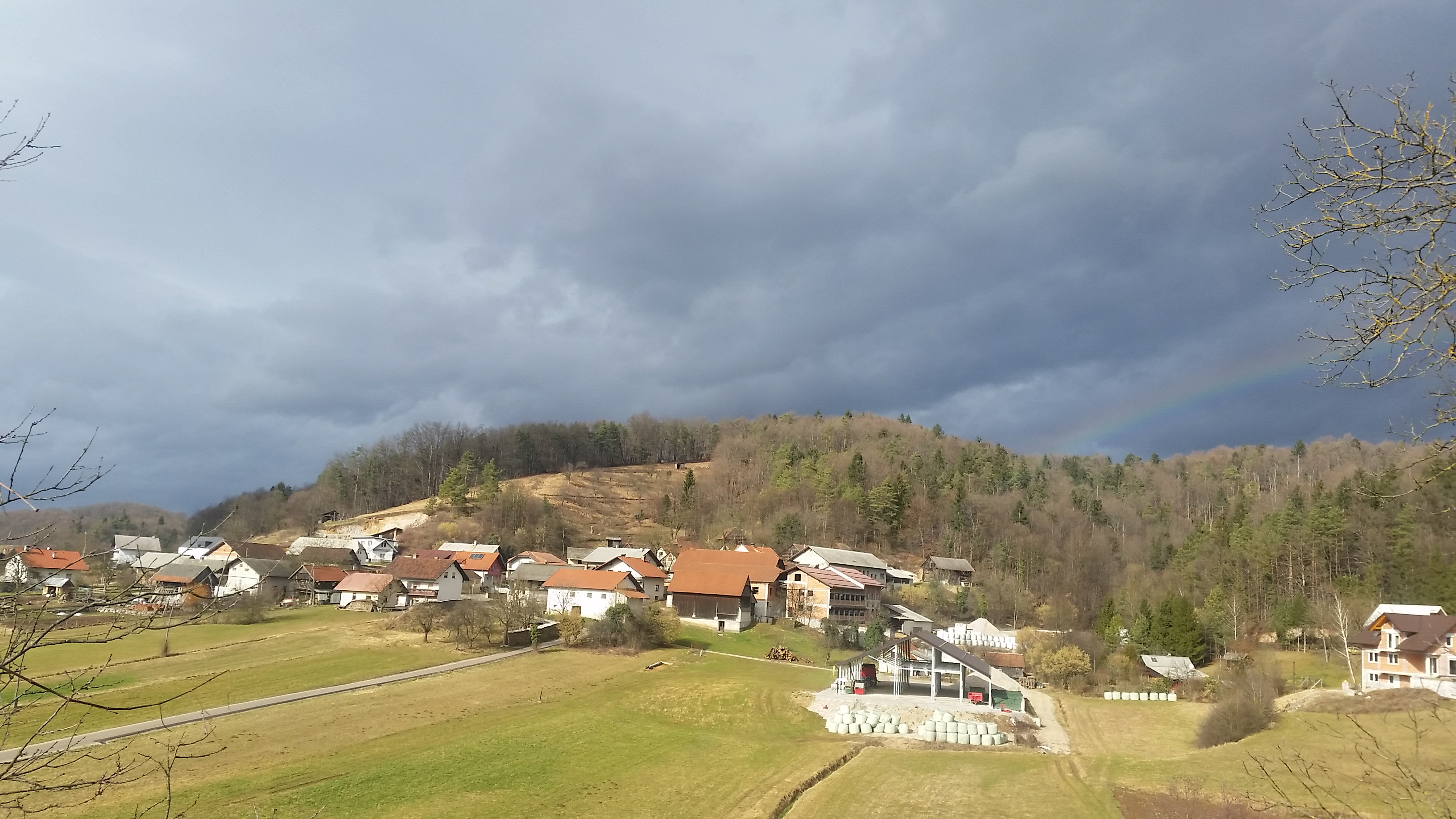 Vas